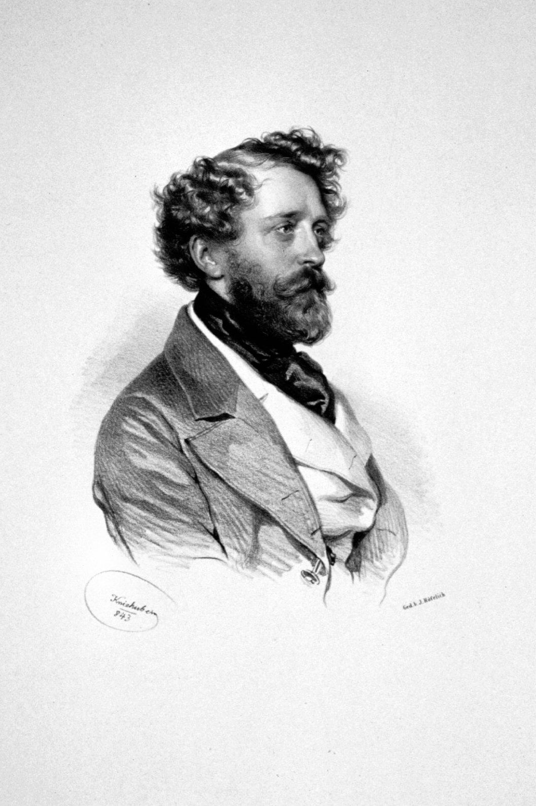 Eduard Cramolini (1807-1881) Maler in Wien um 1840. Bruder des Sängers Ludwig Cramolini.